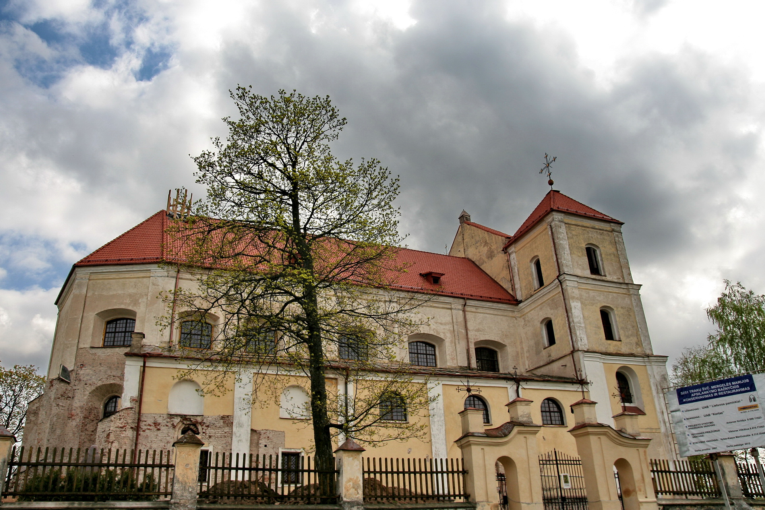 Trakai church